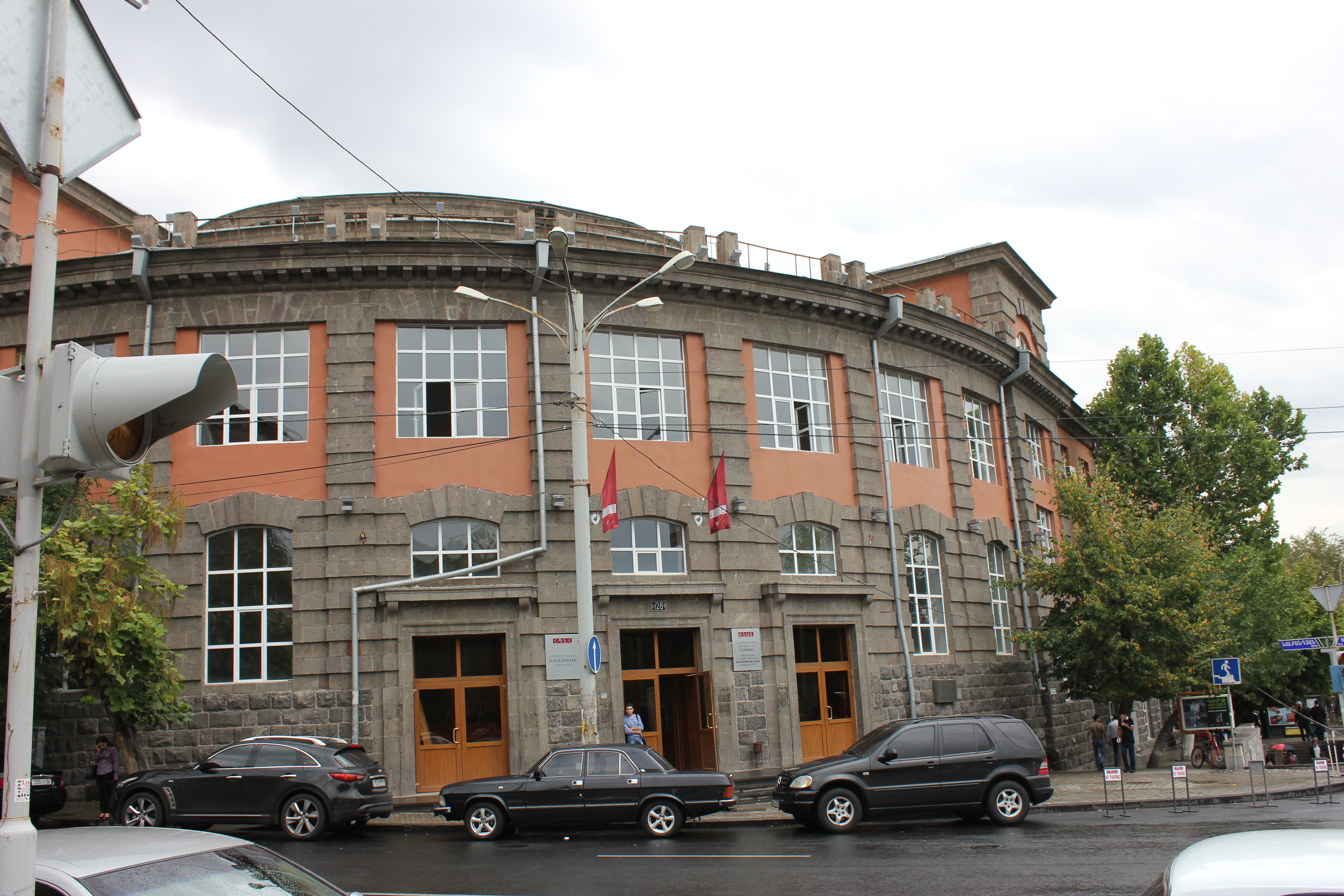 Անասնաբուծական-անասնաբուժական ինստիտուտը 1928 թ. Նալբանդյան փող. 128, Ճարտ.` Ա. Թամանյան 6/79